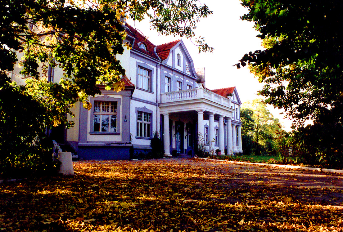 Uścikowo - pałac eklektyczny z XIX wieku (zabytek nr rejestr. 149/A)